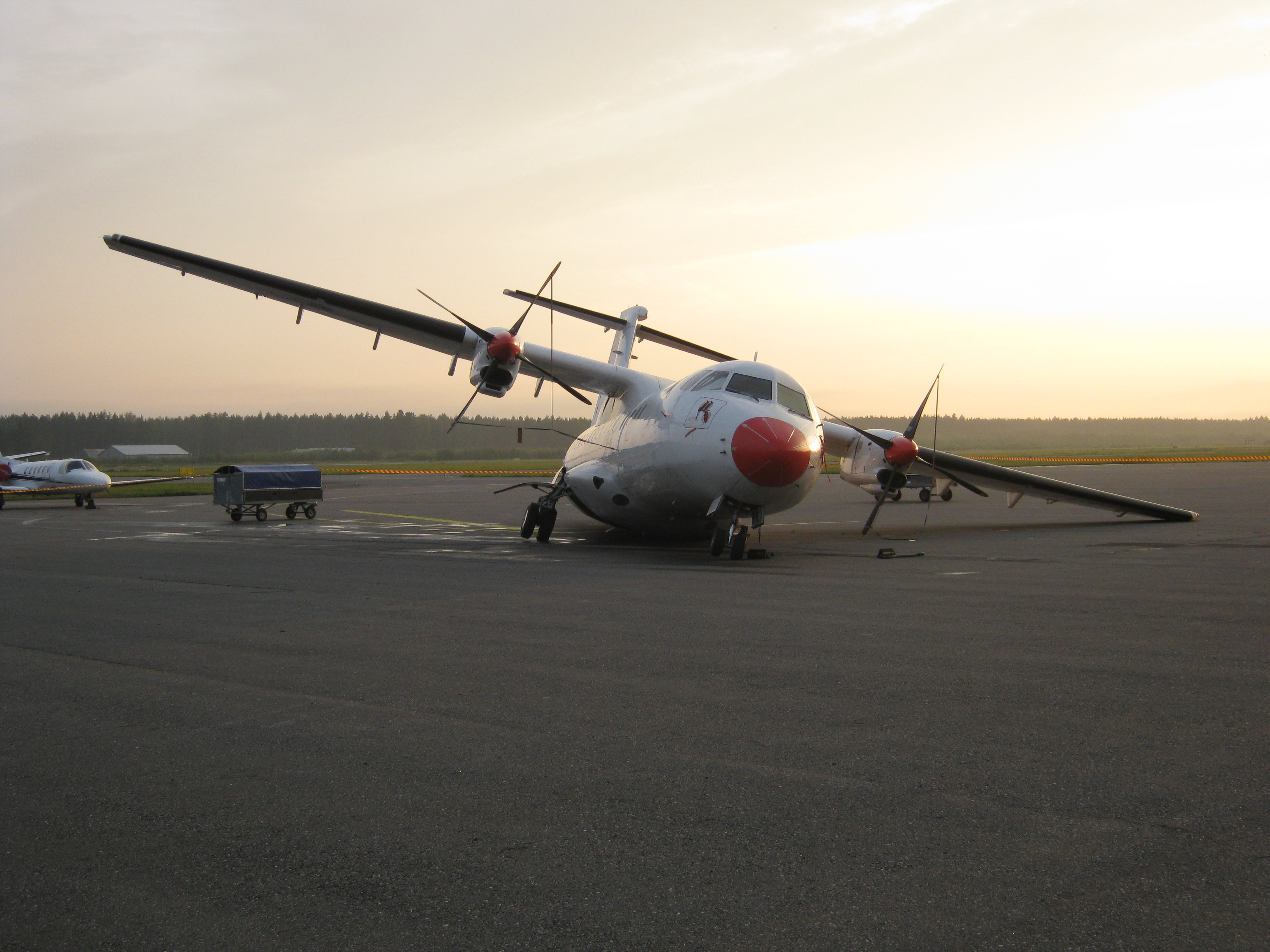 Iron Maiden -yhtyeen kiertuehenkilökunnan lentokone myrskyssä vaurioitueena Porin lentoasemalla 8.8.2010.